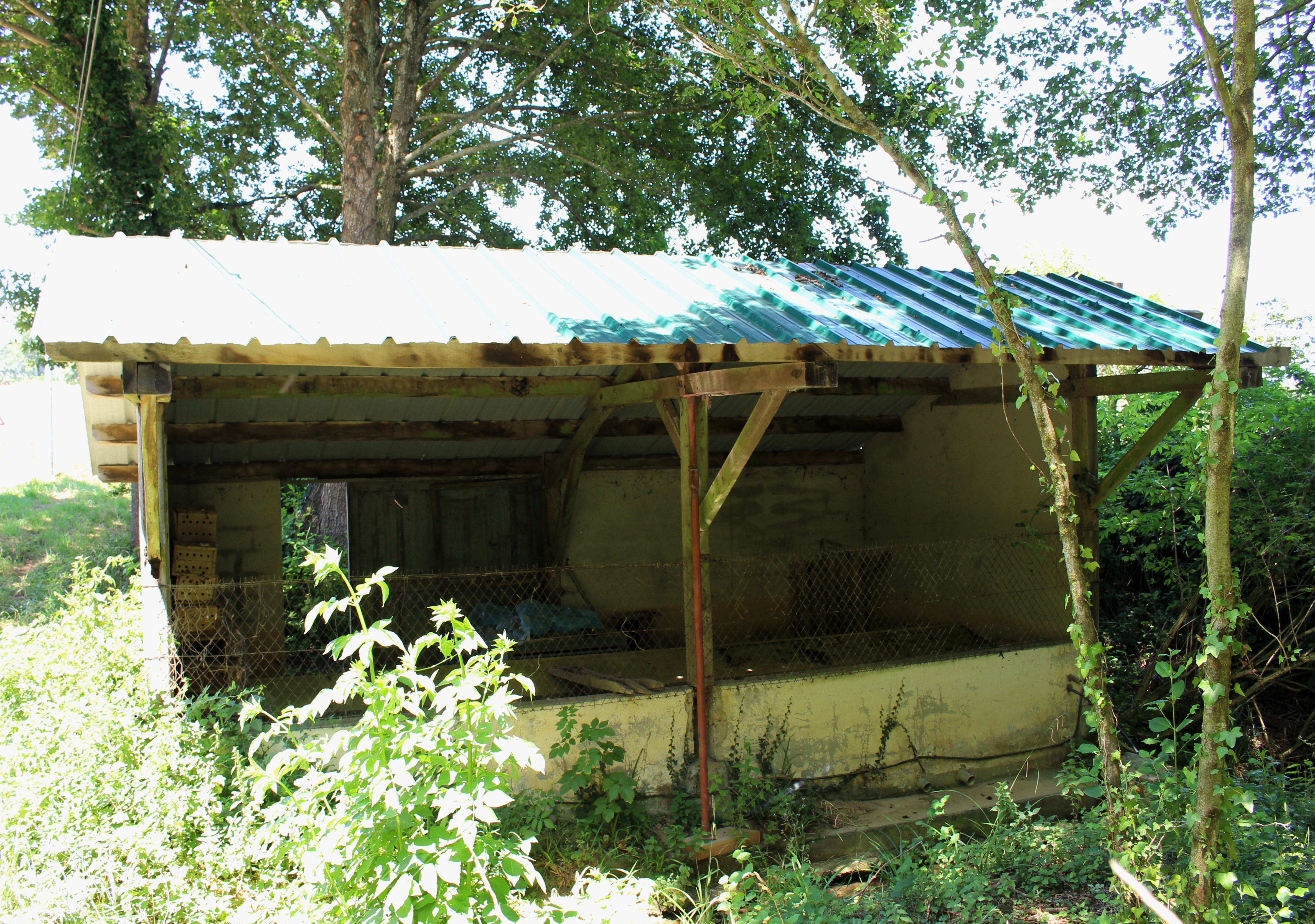 Lavoir de Sadournin (Hautes-Pyrénées)